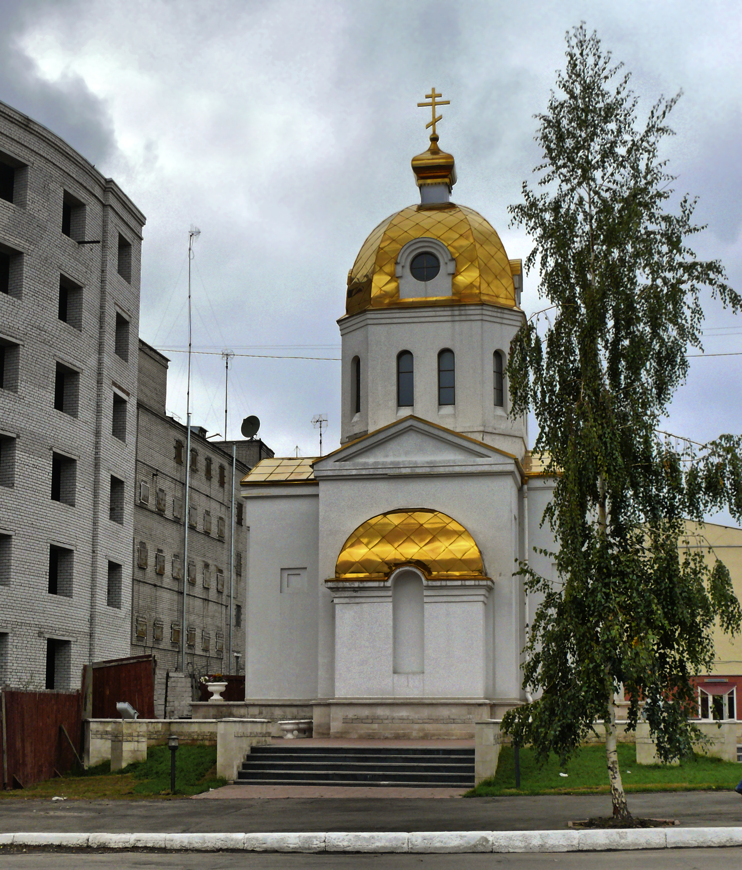 Самара, Часовня в честь святого Александра Невского